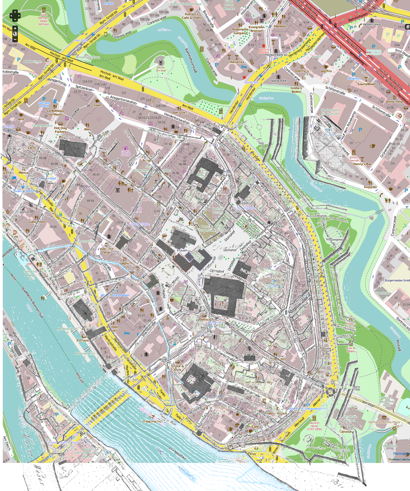 Teil des Murtfeldtplans von Bremen aus dem Jahr 1796 auf Nord gedreht und im Maßstab angepasst auf den entsprechenden Ausschnitt von Openstreetmap gelegt This map may be incomplete, and may contain errors. Don't rely solely on it for navigation.